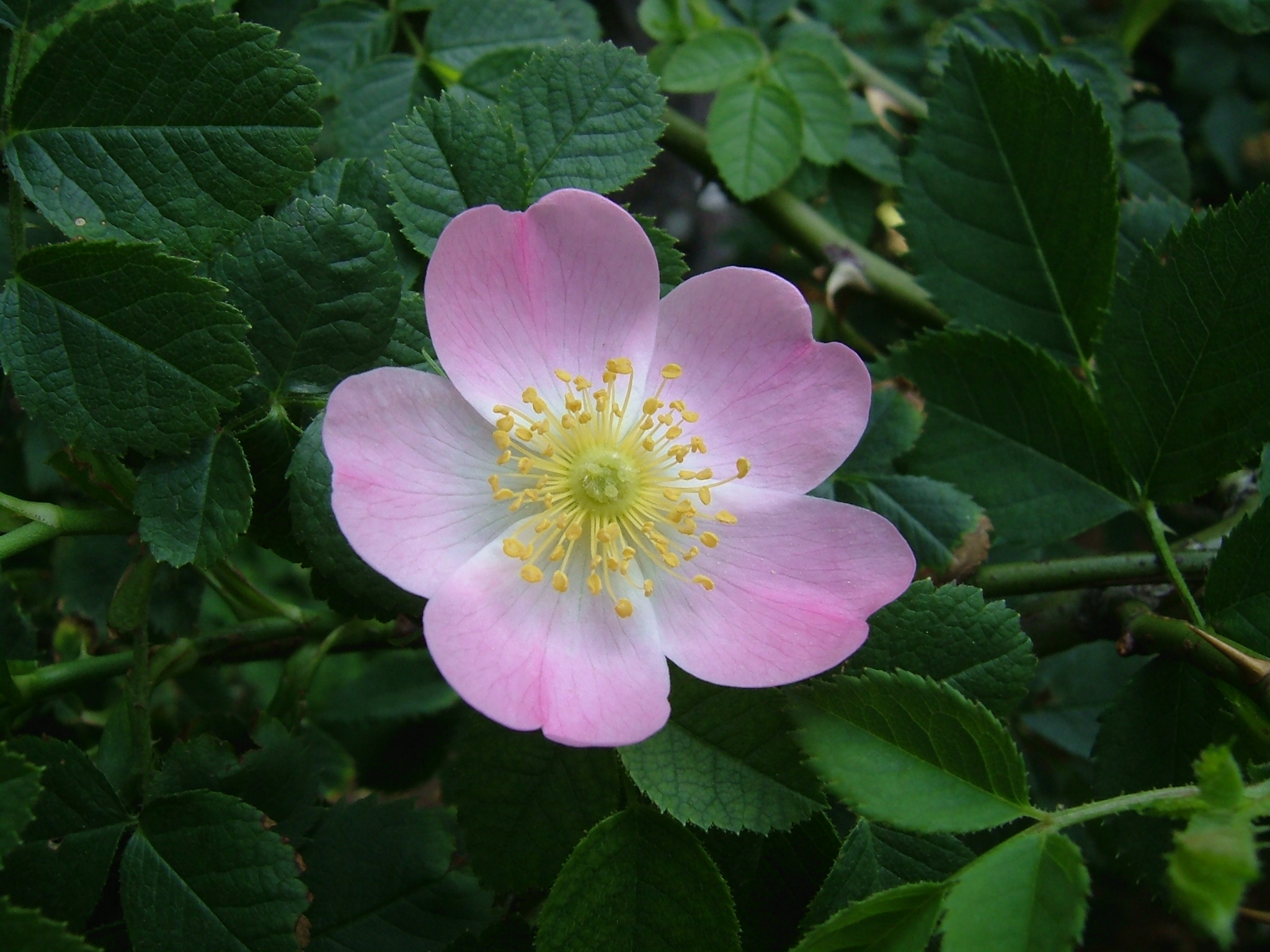 ロサ カニナ（ドッグローズ） Rosa canina